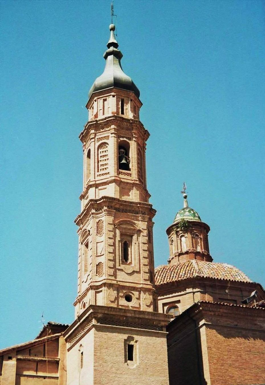 Iglesia de San Juan el Real de Calatayud